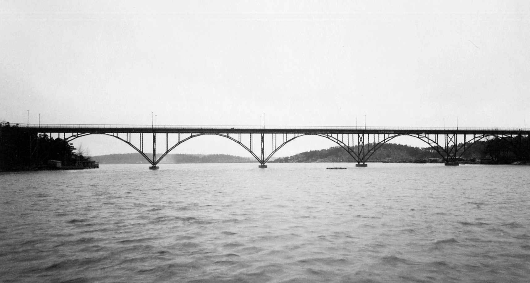 Stora Essingebron (riven), arkitekt Paul Hedqvist